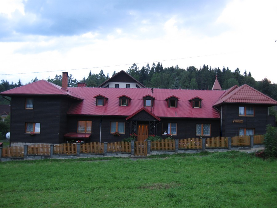 klasztor